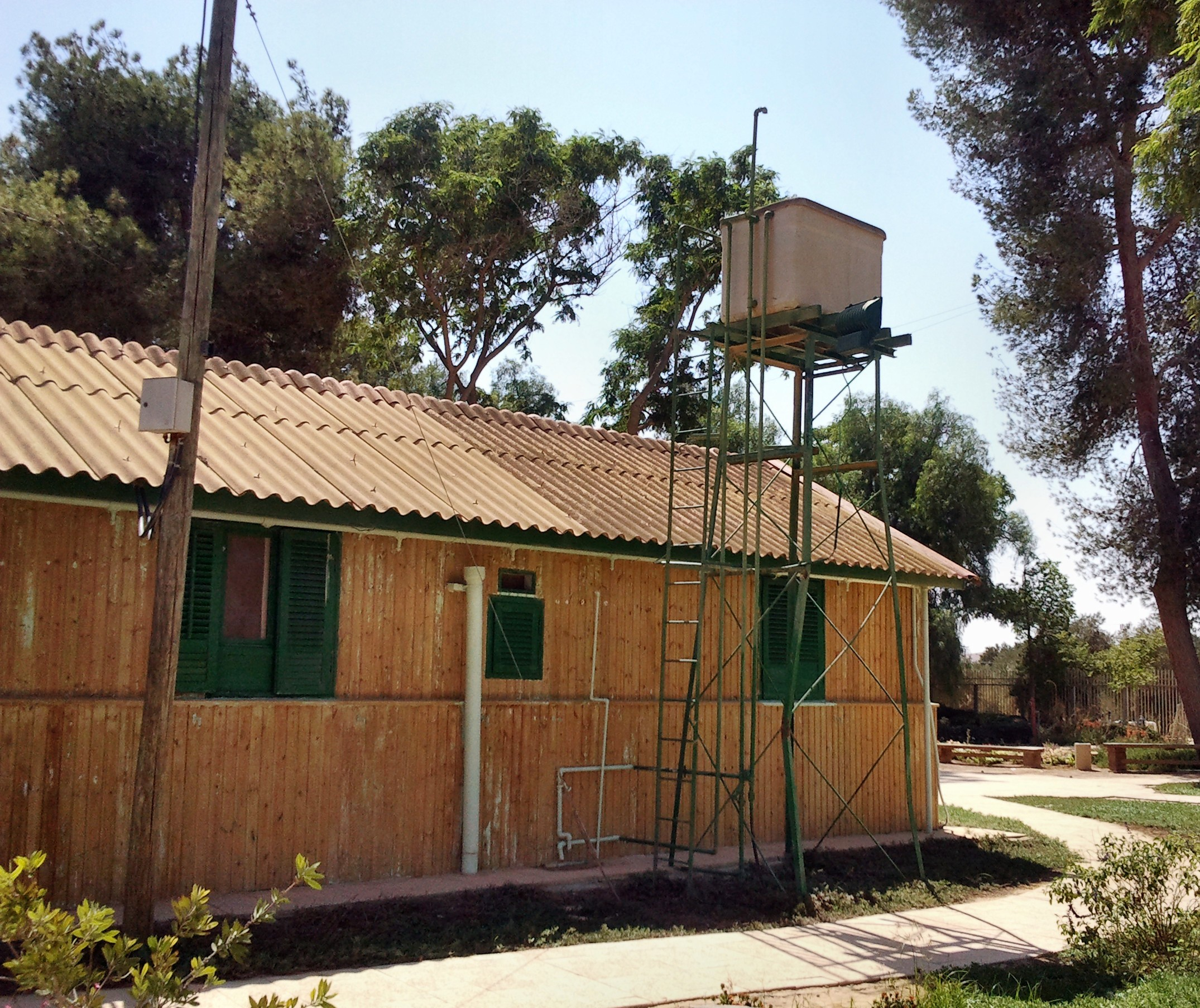 צריף בן-גוריון הוא צריף המגורים בקיבוץ שדה בוקר, אשר שימש את דוד בן-גוריון ואשתו פולה בשנים 1953 - 1973, ואשר הפך לאחר מותו למוזיאון העומד לרשות הציבור, במסגרת המכון למורשת בן-גוריון.